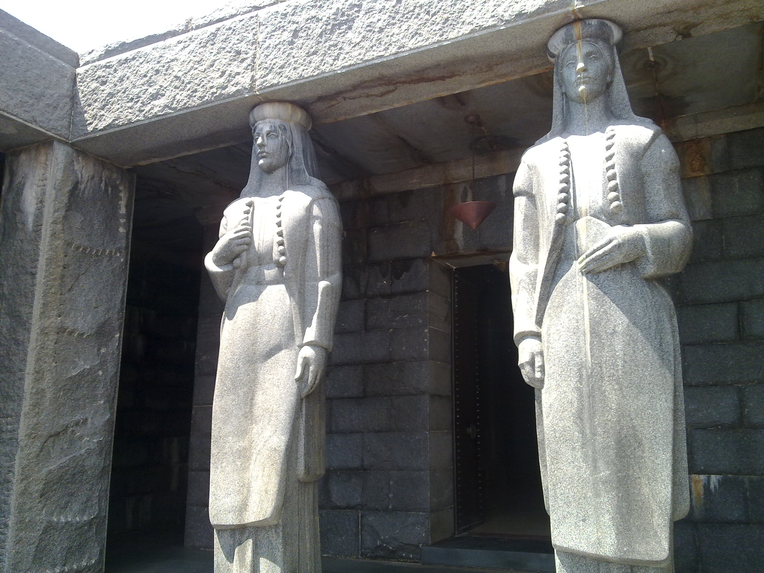 Статуи на входе в Мавзолей Негоша на горе Ловчен.